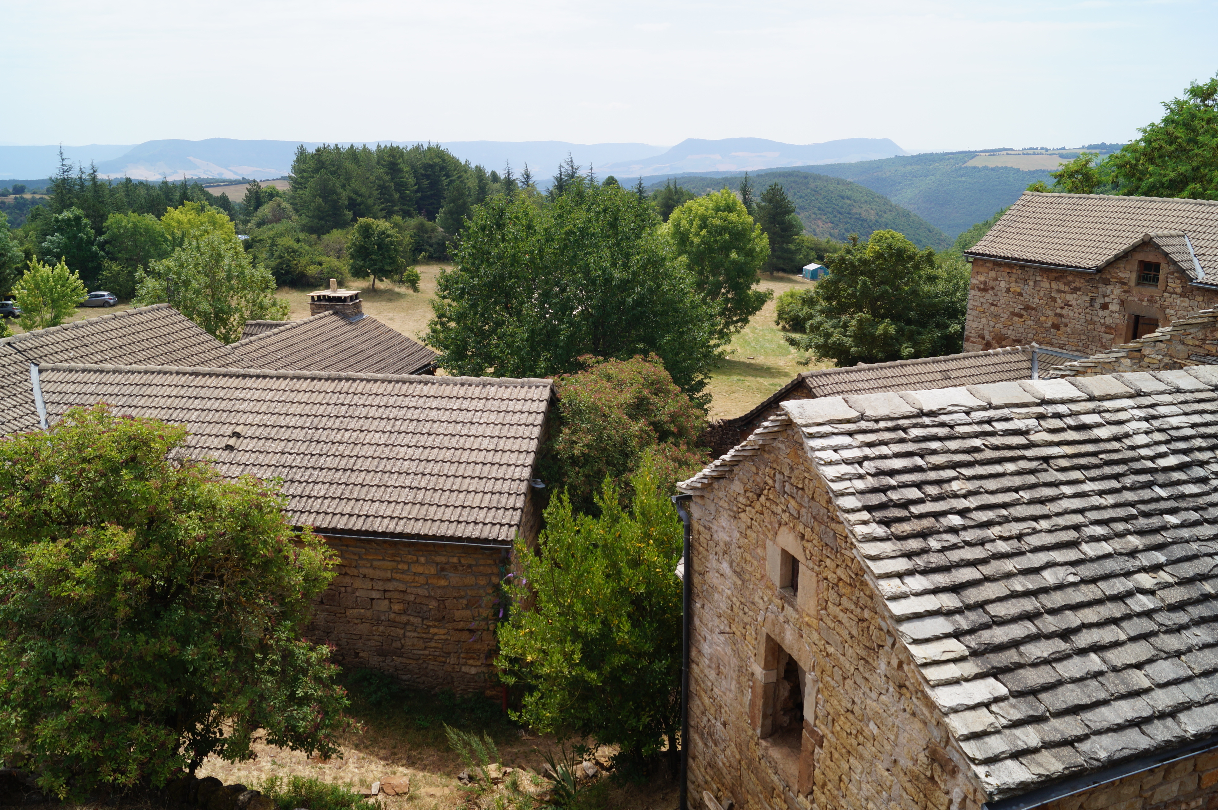 Vue du hameau et de la plaine de Bécours (Verrières, Aveyron) depuis l'intérieur du hameau.